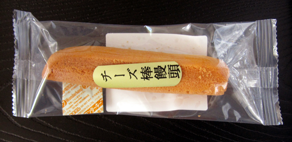 チーズ饅頭をそのまま棒状にしてある